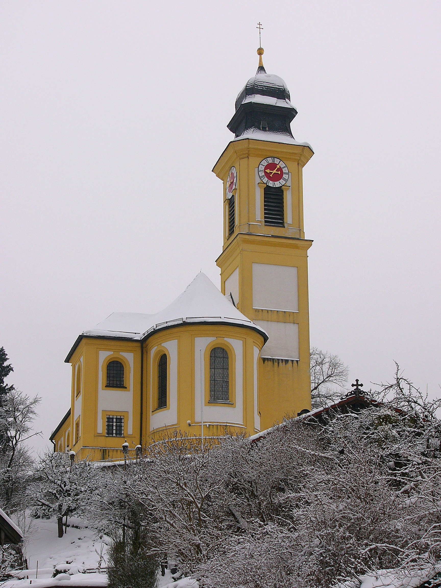 Katholische Pfarrkirche St. Georg, barocker Saalbau mit Lisenengliederung, eingezogener Apsis und spätgotischem Chorwinkelturm, Johann Georg Ettenhofer, 1729/1732.This is a photograph of an architectural monument.